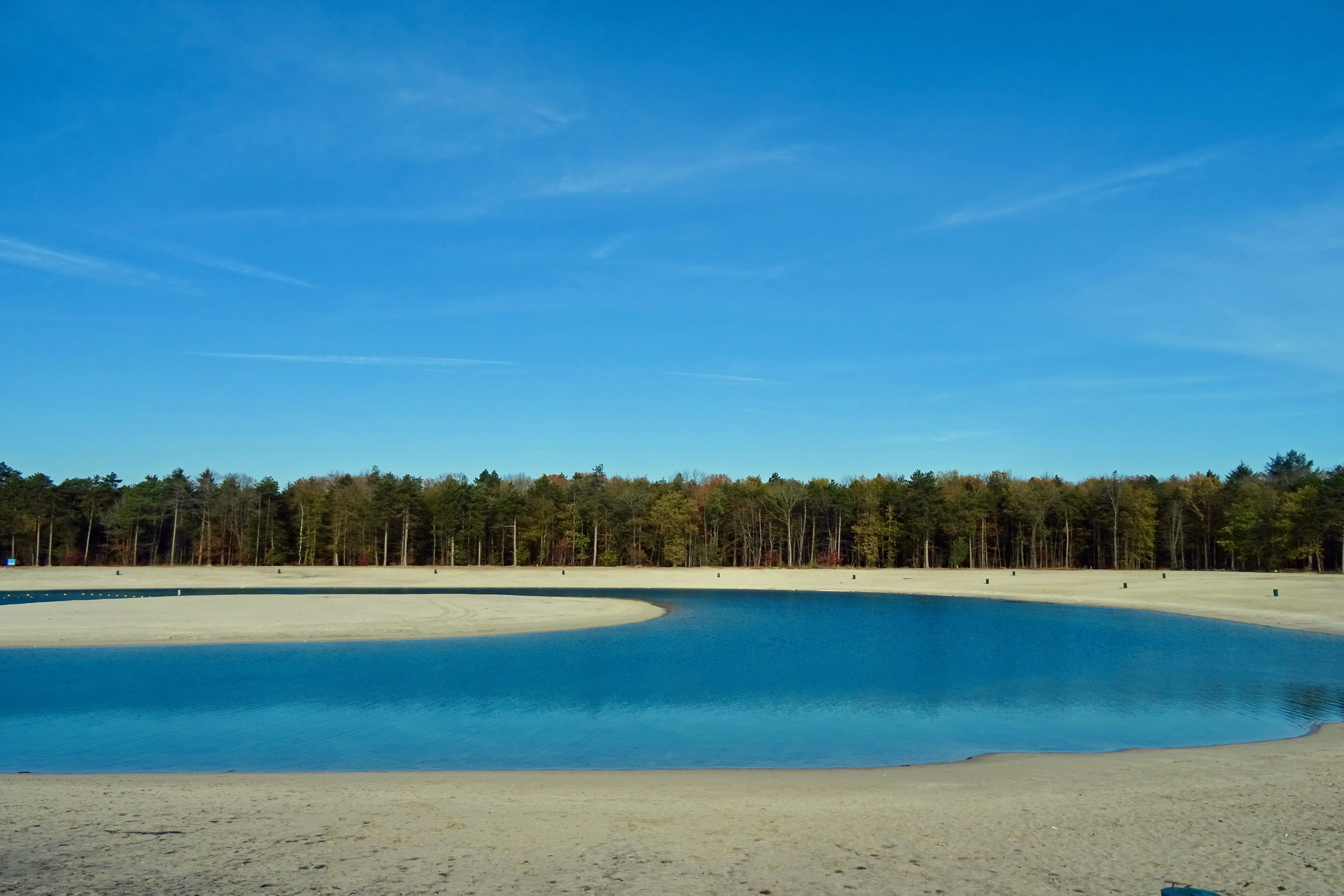 Meer (deels zwemplas) ontstaan als resultaat van de zandwinning in het Gasselterveld